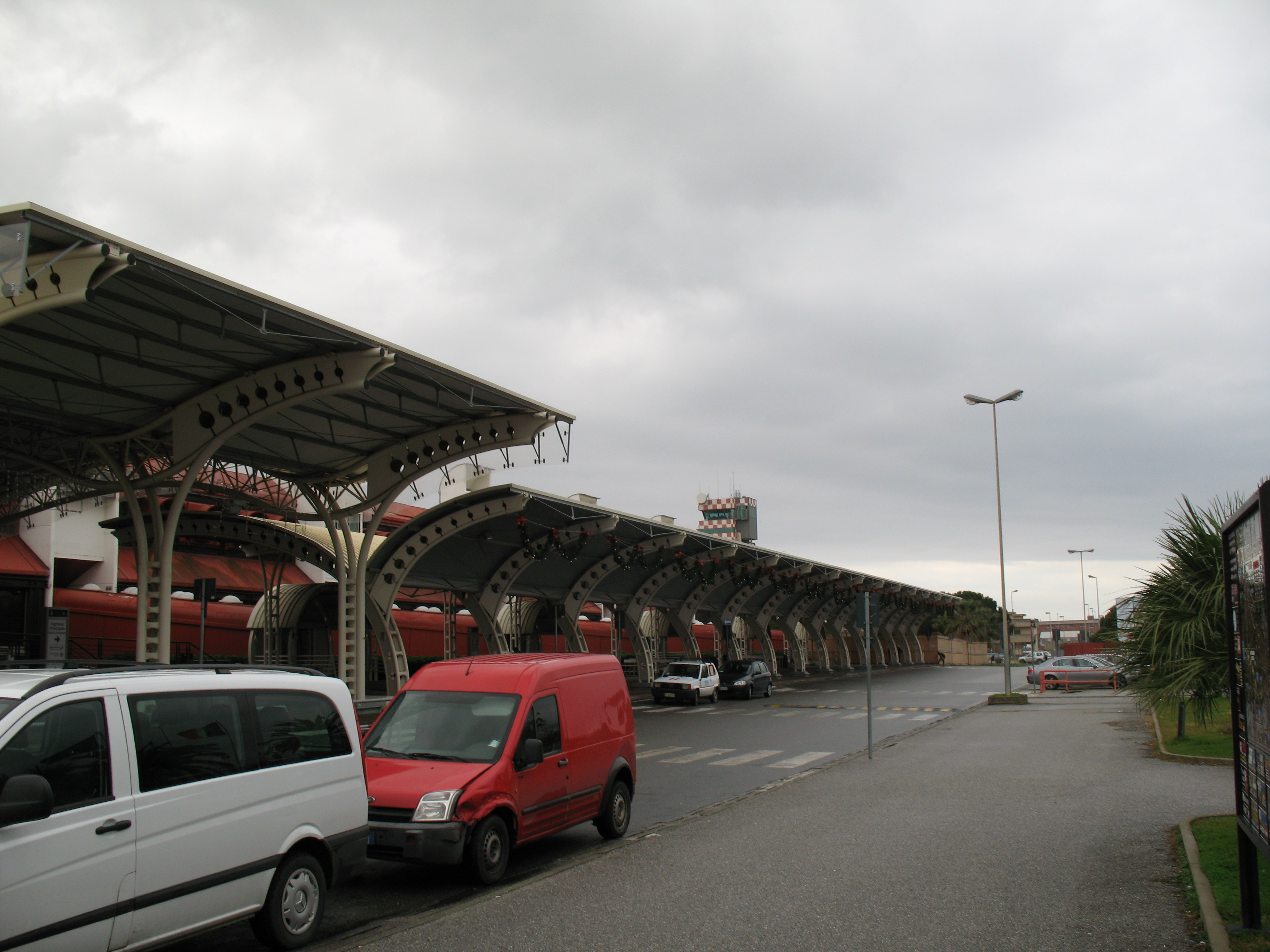 Airport of Lamezia Terme, vista laterale (Aeroporto di Lamezia Terme or: Lamezia Terme International Airport)